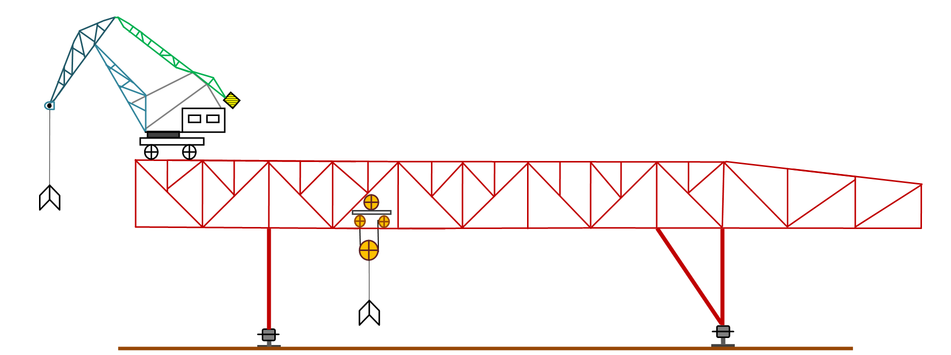 Мостовой перегружатель с грейфером (со стреловым краном на мосту)